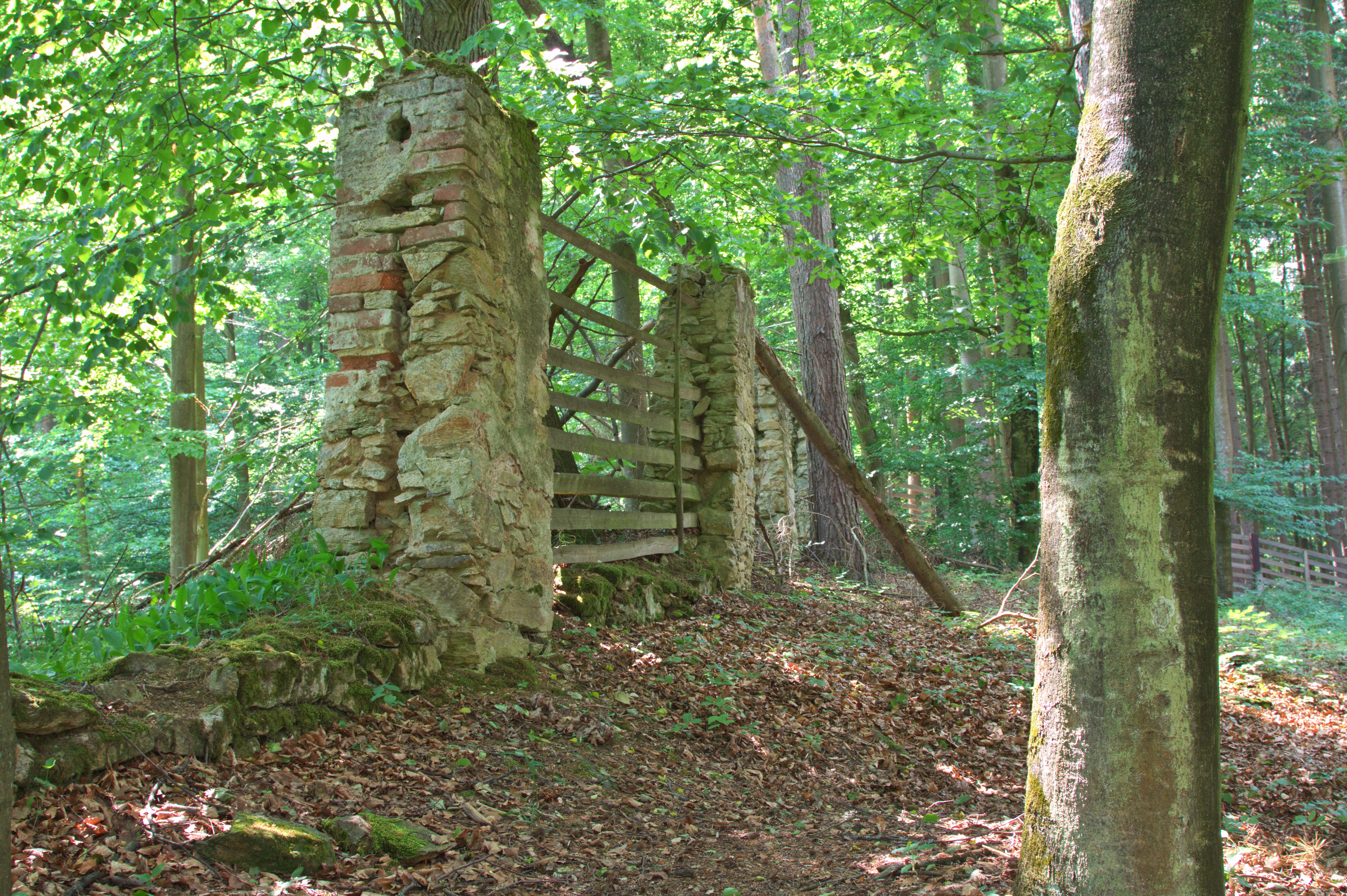 Baba (přírodní památka)